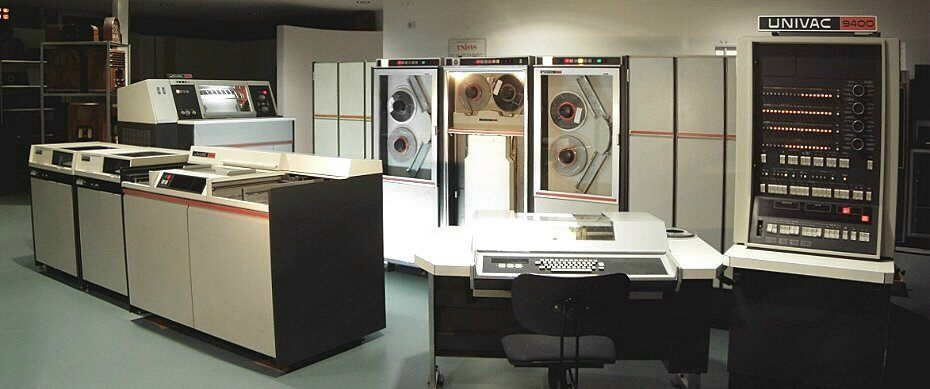 Bild einer Univac 9400-Installation des deutschen Technikmuseums technikum29